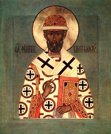 Saint Filipp, mitropolitt of Moscow / Philip II, Metropolitan of Moscow, Святитель Филипп, митрополит Московский. Икона XX века. Из Трапезного Сергиевского храма Троице-Сергиевой лавры.